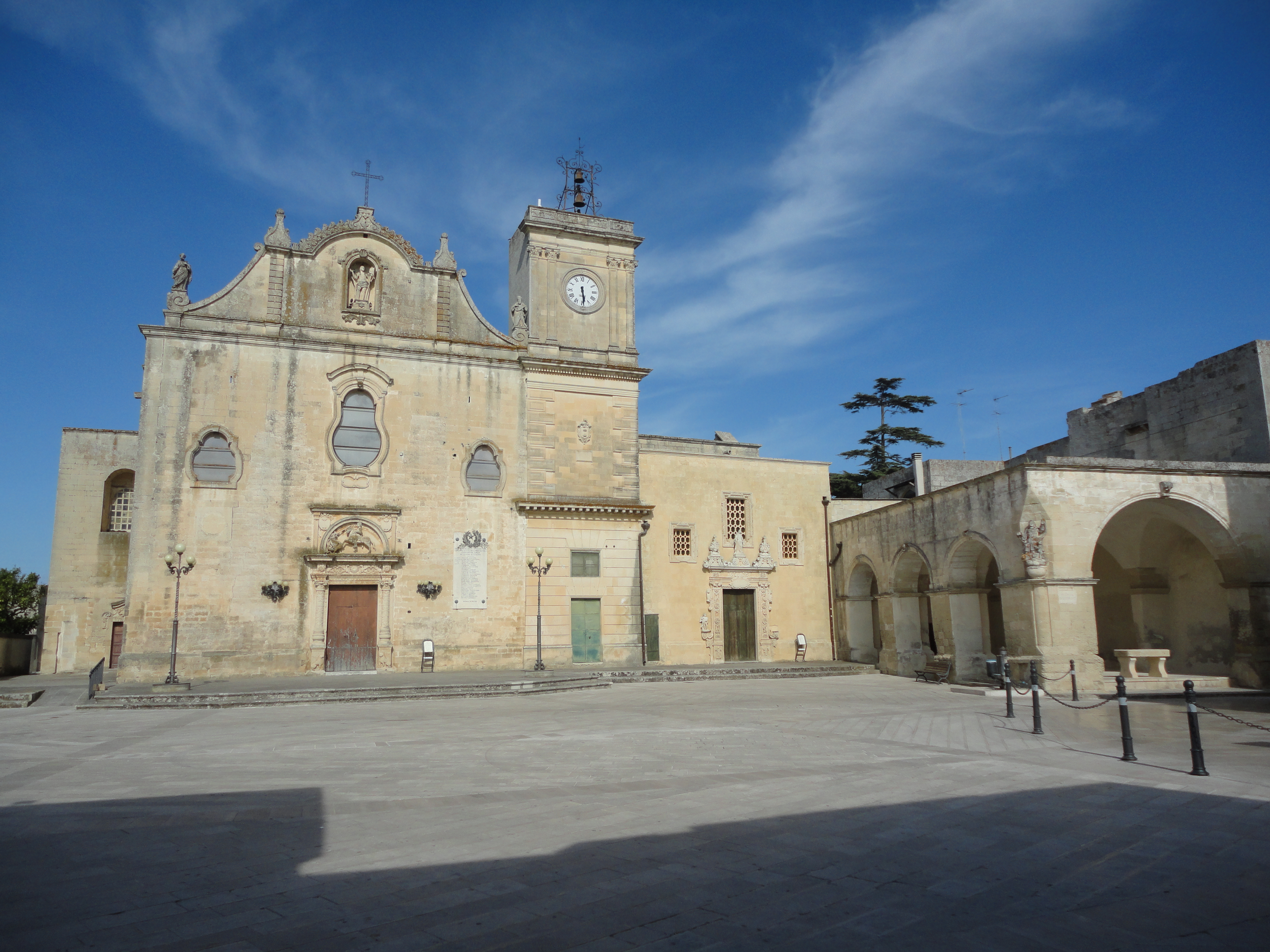 Piazza san Giorgio di Melpignano, Lecce